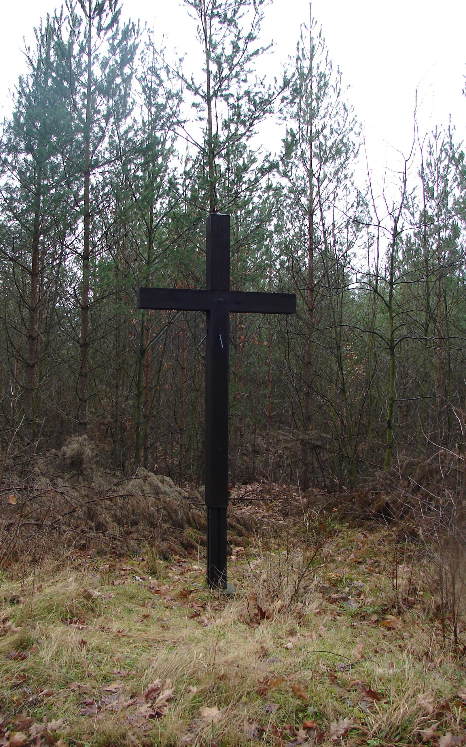 Schwarzes Kreuz, Dresdner Heide, am Kannenhenkel